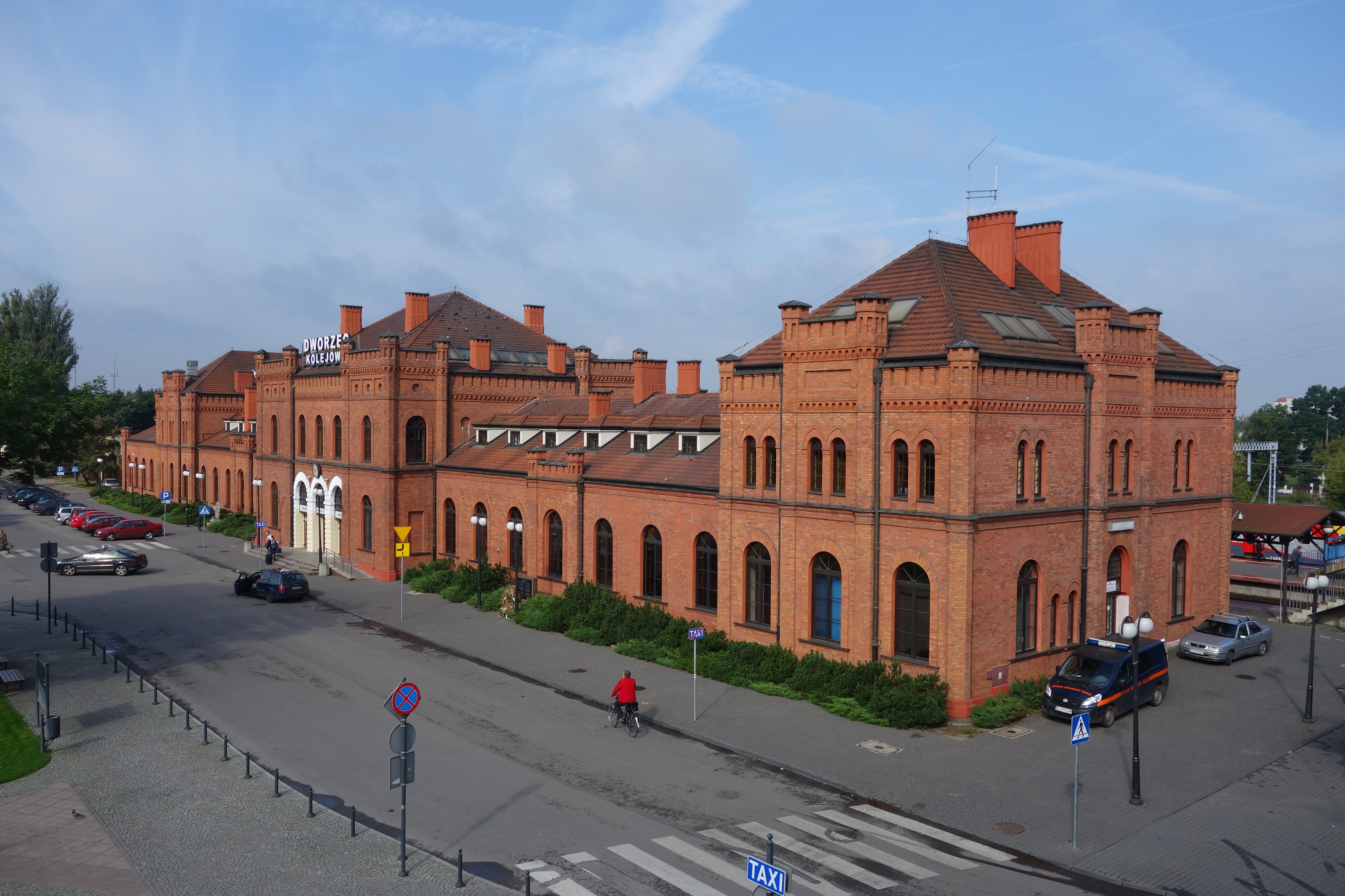 Skierniewice - dworzec kolejowy , You can see all photographs in category Wikiekspedycja kolejowa 2014.